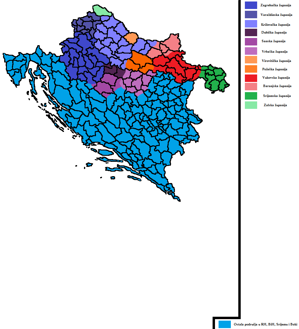 Sjeverne županije u vrijeme Zadarskog mira